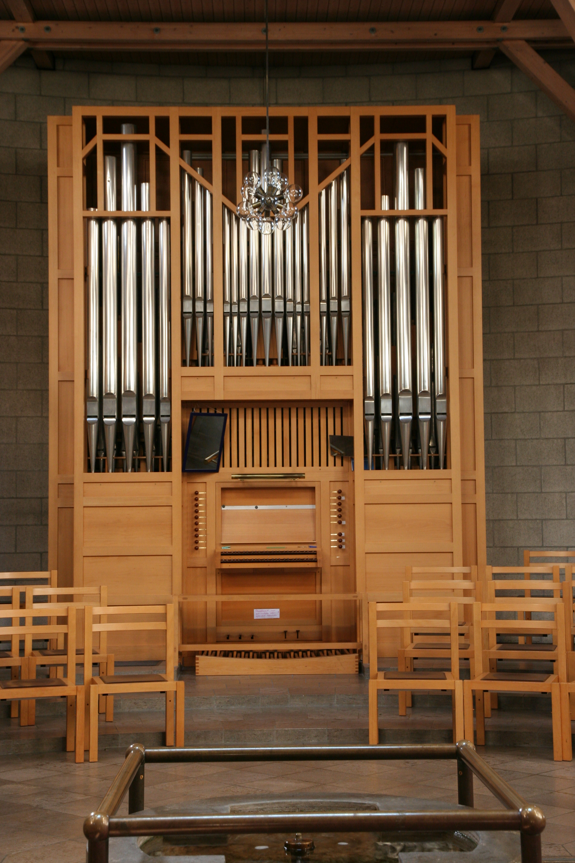 Römisch-katholische Pfarrkirche St. Josef Affoltern am Albis, Orgel